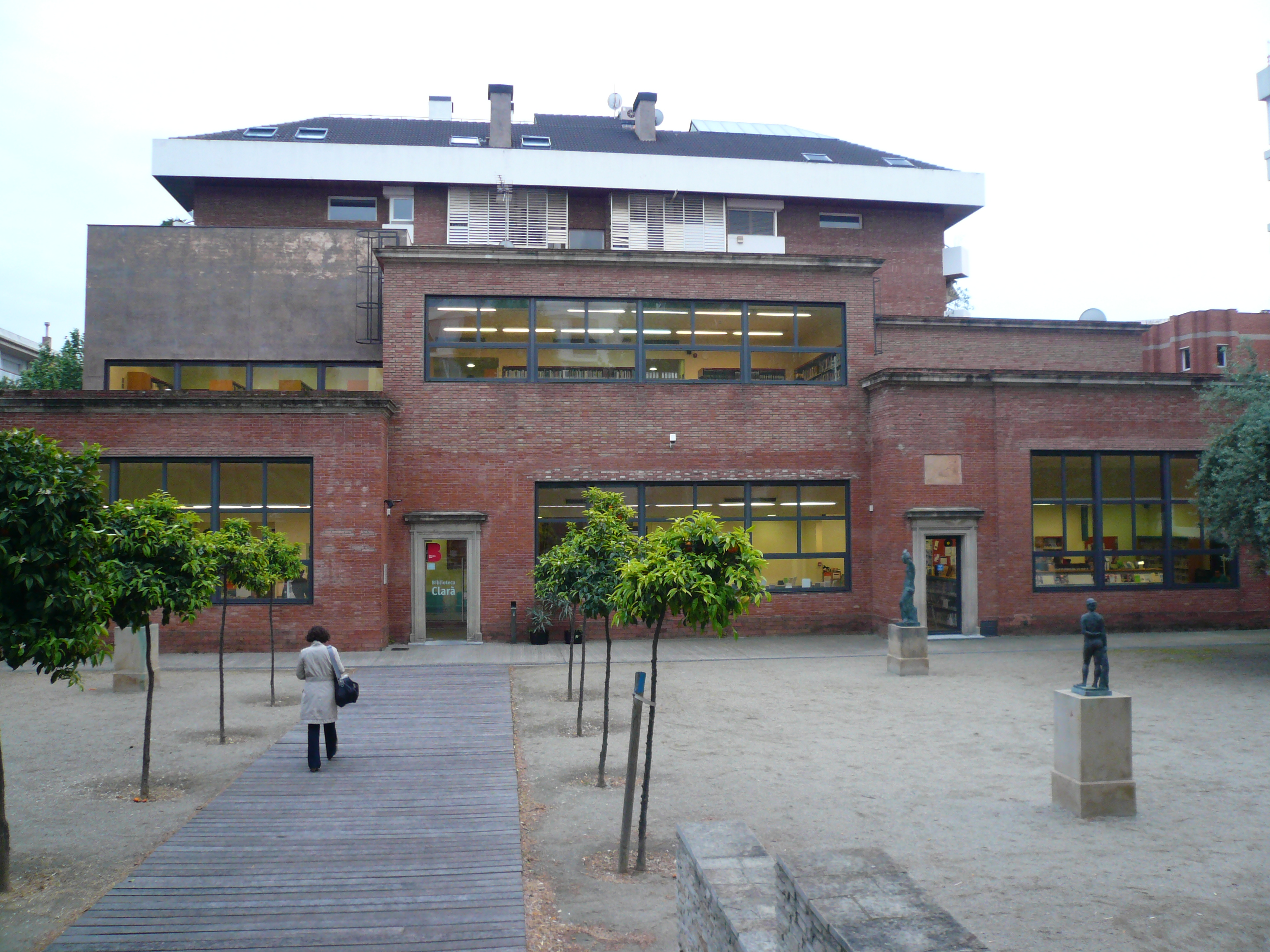 Bronzes de Josep Clarà al jardí de la biblioteca Clarà, a les Tres Torres.